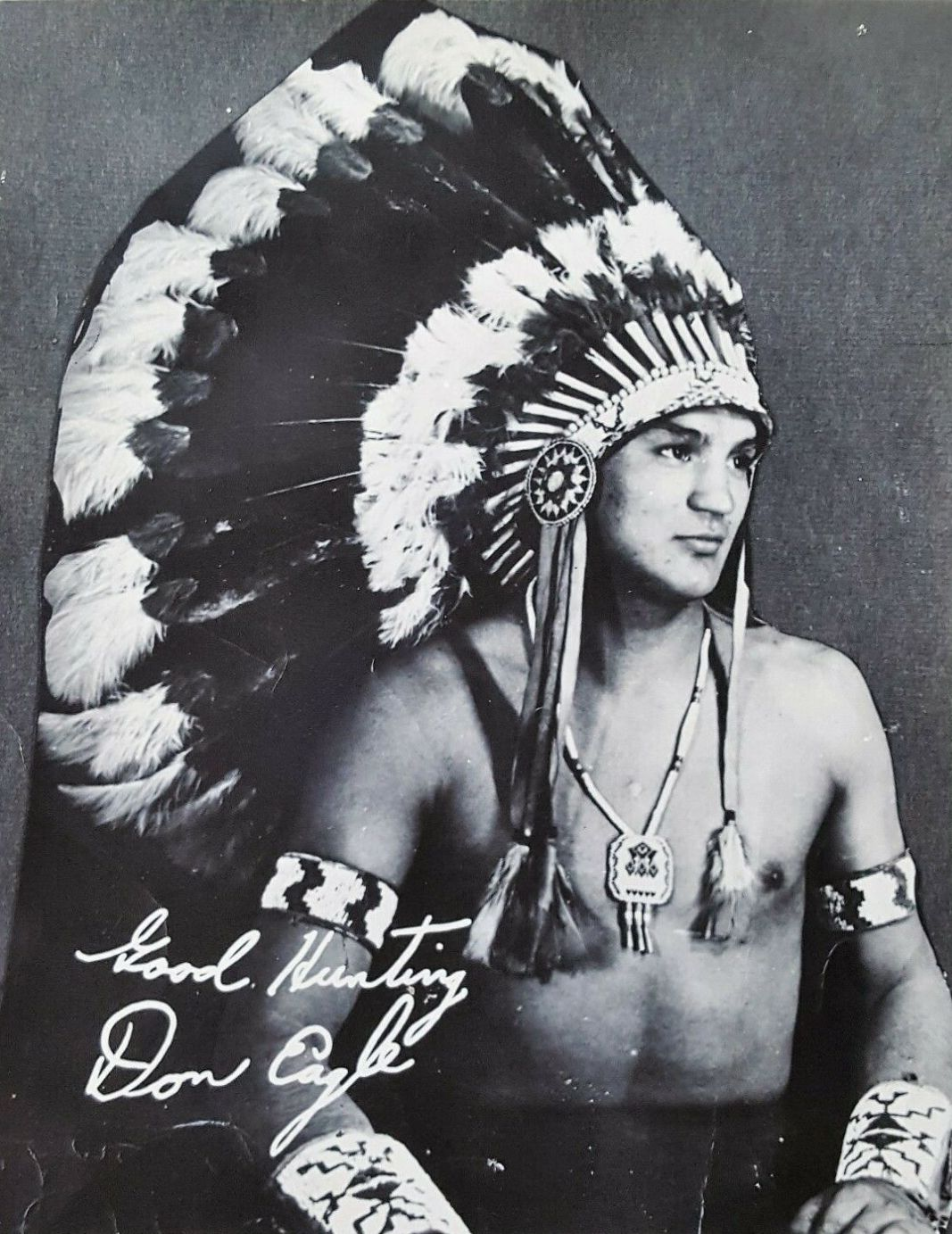 Chief Don Eagle dans les années 1950